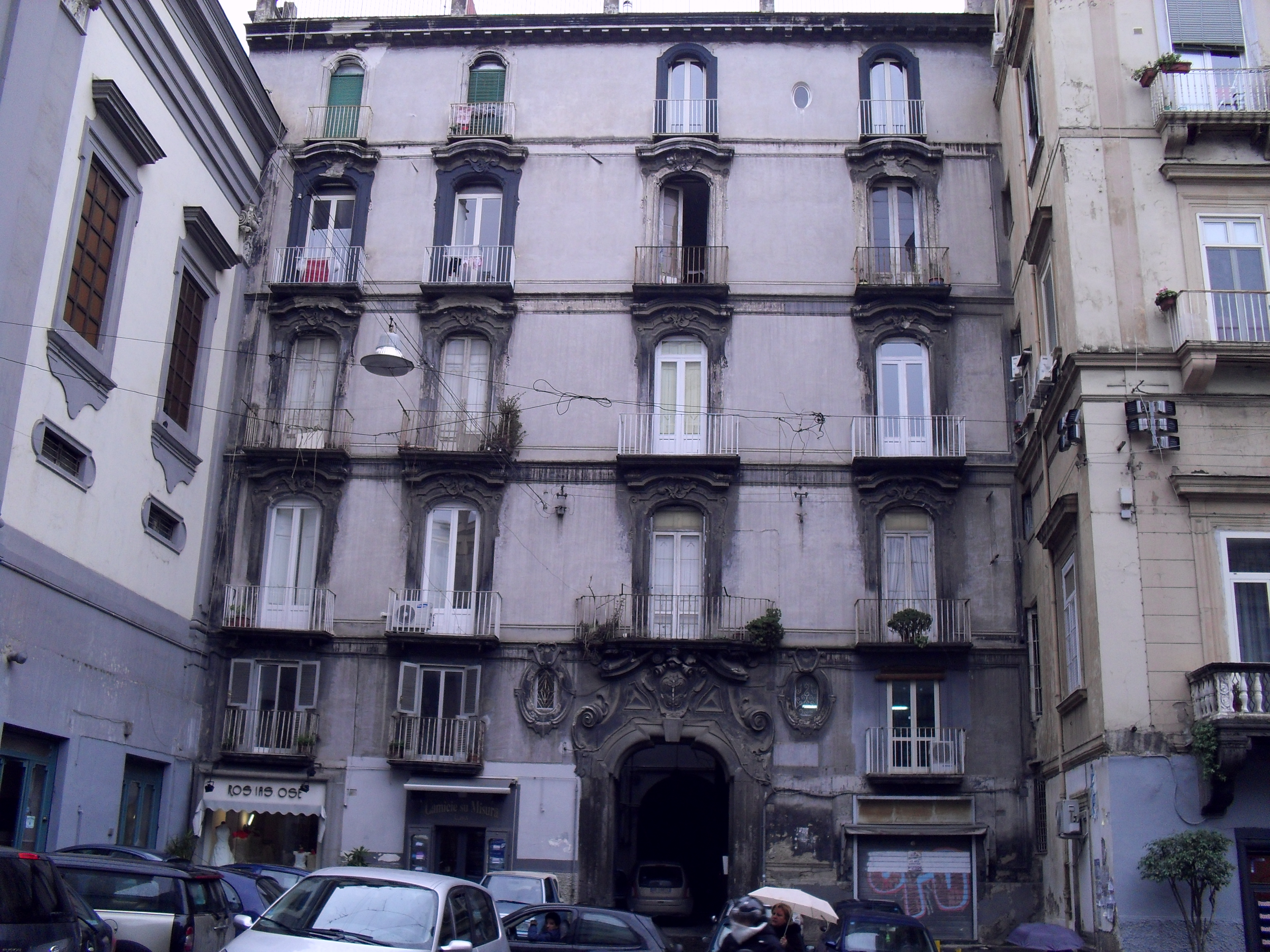 palazzo De Bellis in via Duomo (Napoli)